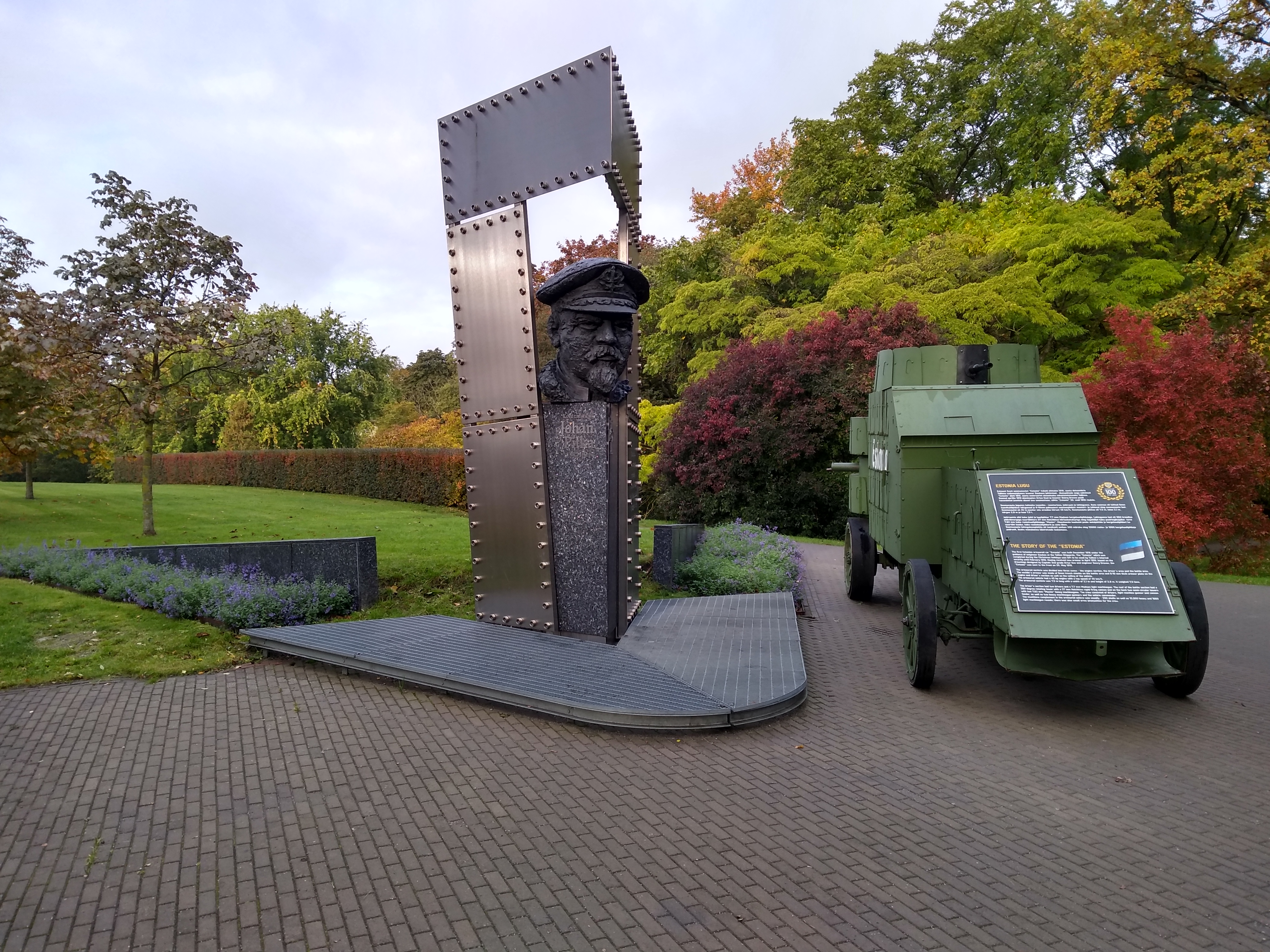 Admiral Johan Pitka mälestusmärk Tallinnas koos ajaloolise soomusauto "Estonia" koopiaga